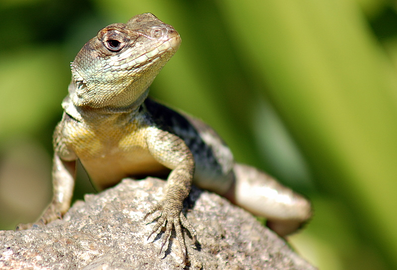 Jardim Botânico de São Paulo